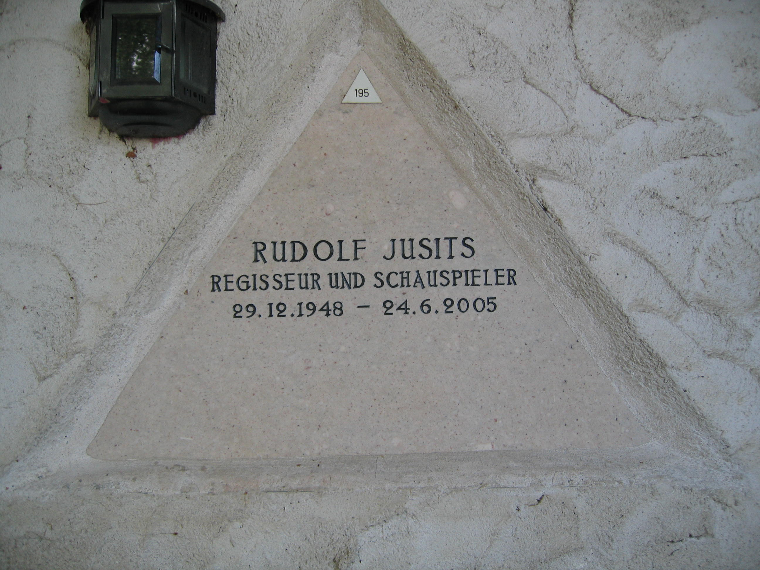 Rudolf Jusits Urnengrab im Urnenhain der Feuerhalle Simmering.